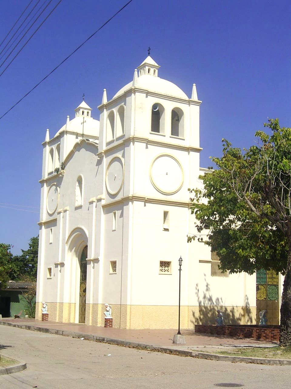 Iglesia Chiriguana Cesar en Colombia